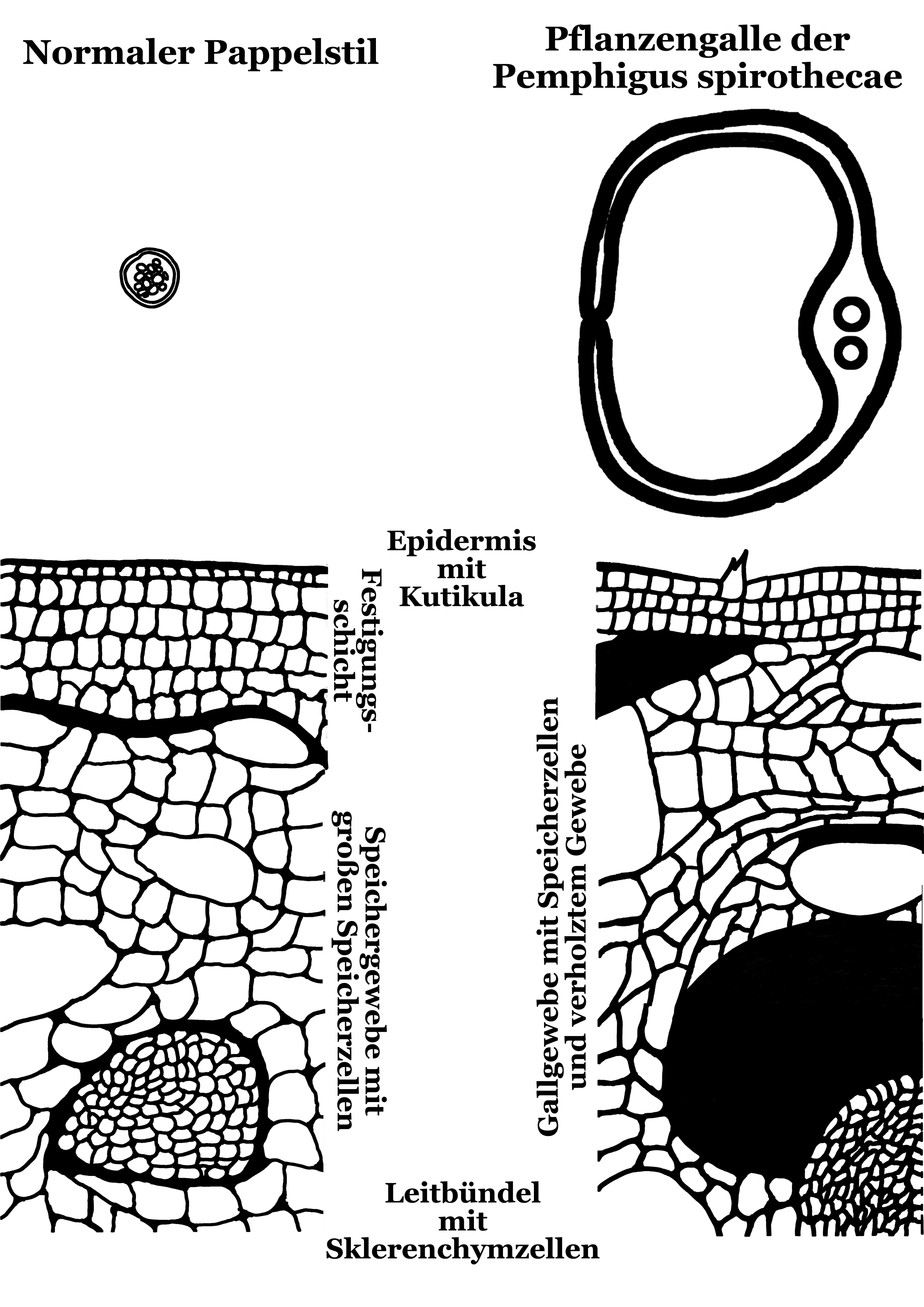 Vergleichender idealisierter, handgezeichneter querschnitt durch sprosstängel einer pappel und einer galle von pemphigus spirothecae